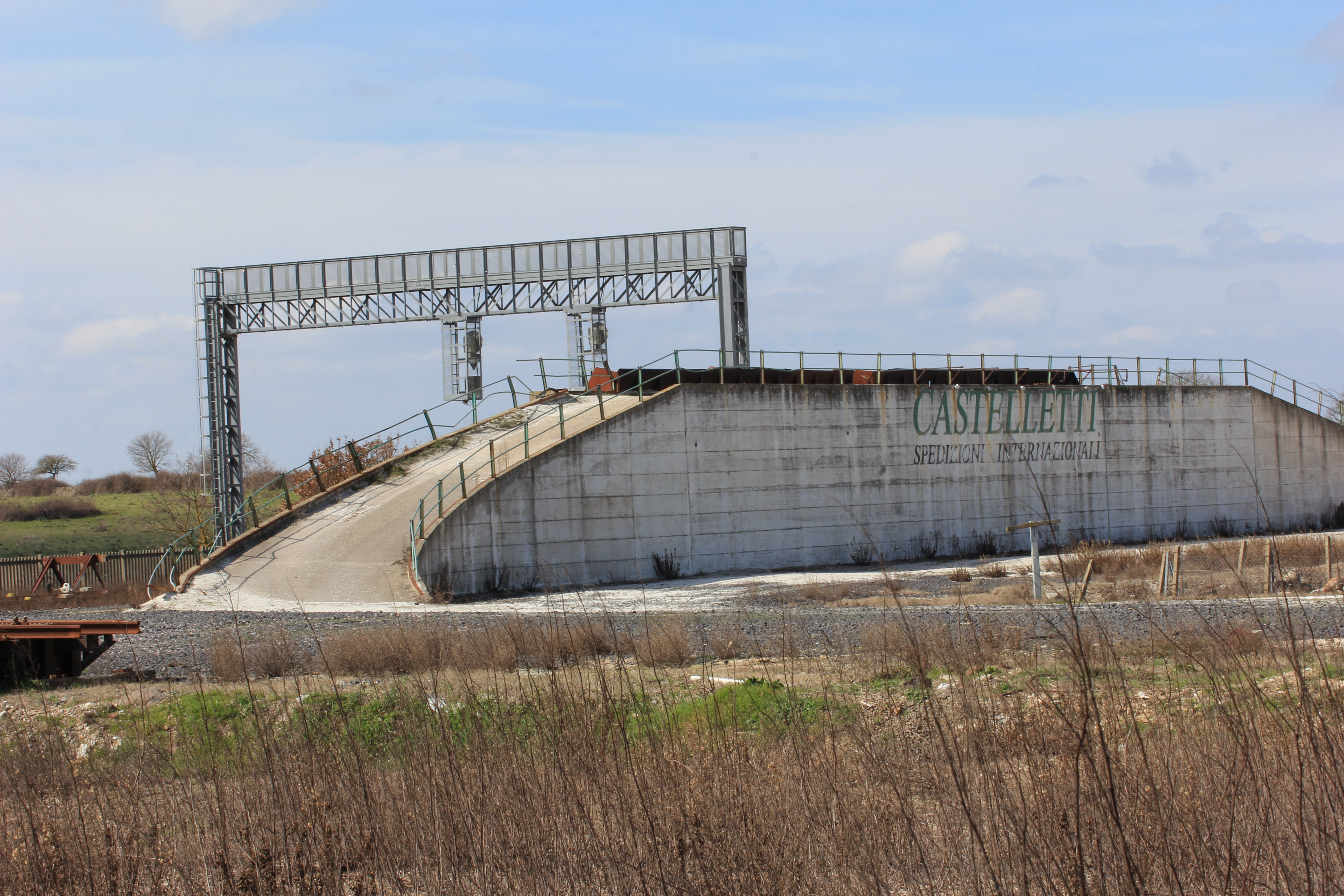 Macomer - Stazione di Campeda